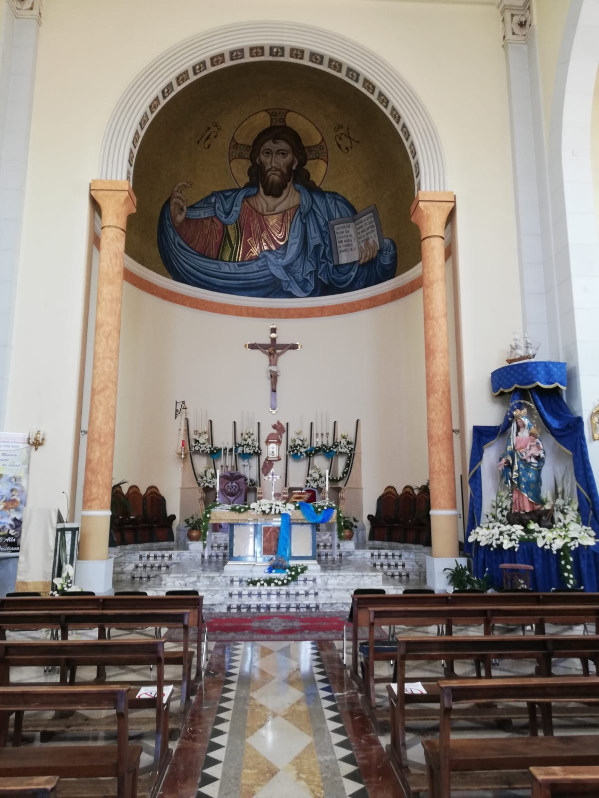 Altare maggiore chiesa Portosalvo